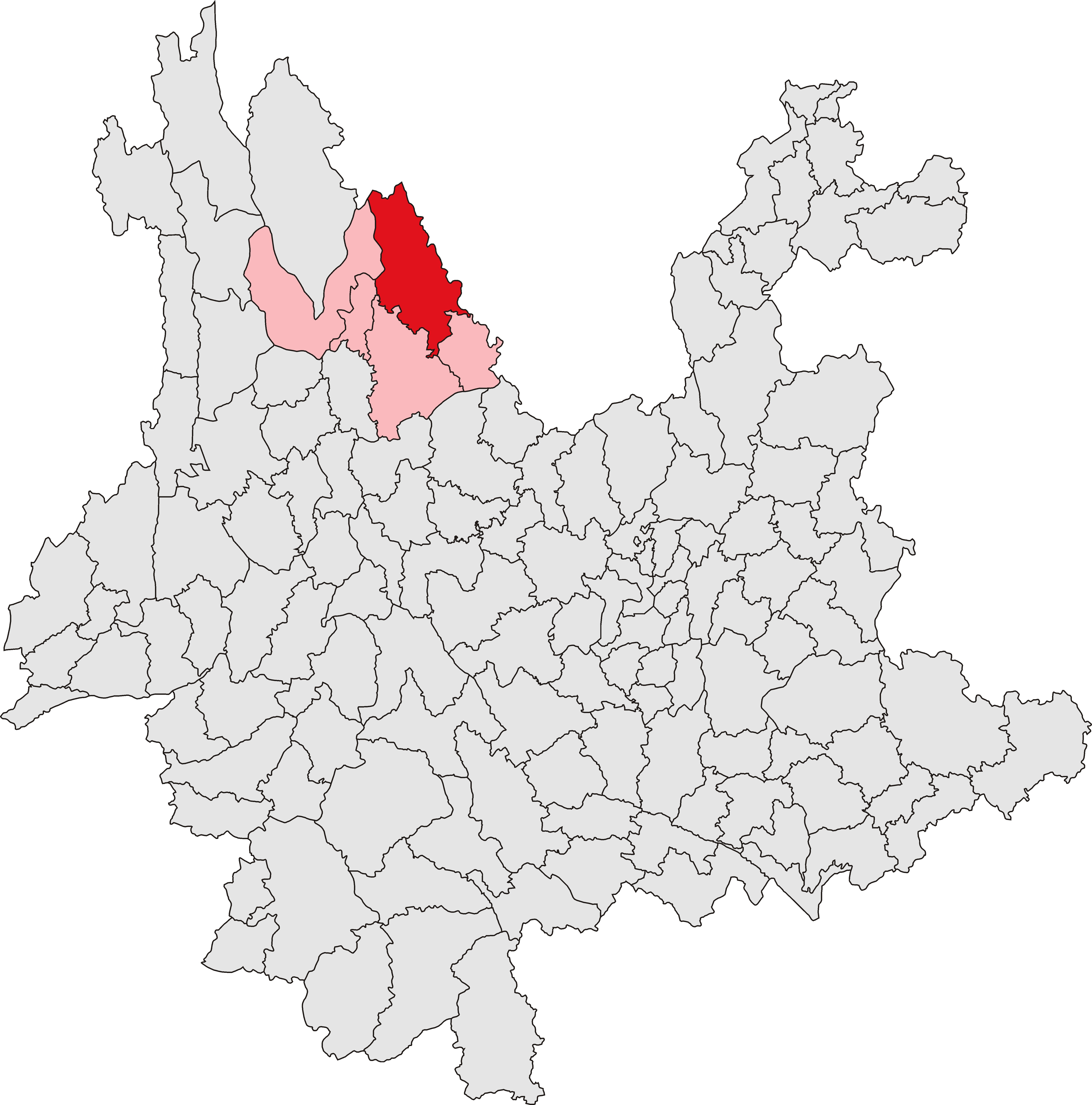 中文（中国大陆）: 宁蒗彝族自治县位置图